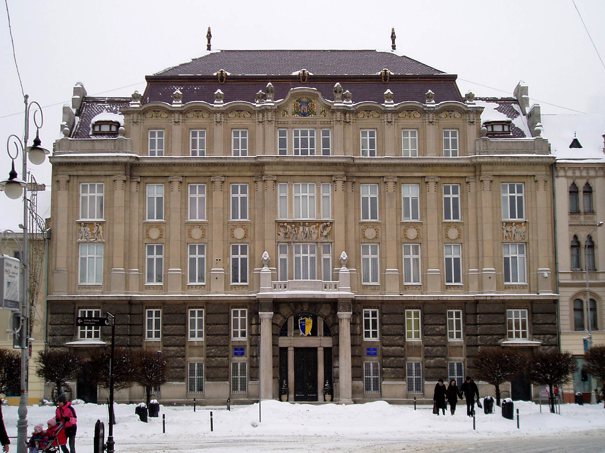 Будинок на проспекті Шевченка, 17 у Львові. Збудований 1910 року за проектом Альфреда Захаревича (1871-1937) і Юзефа Сосновського (1865- після 1918).